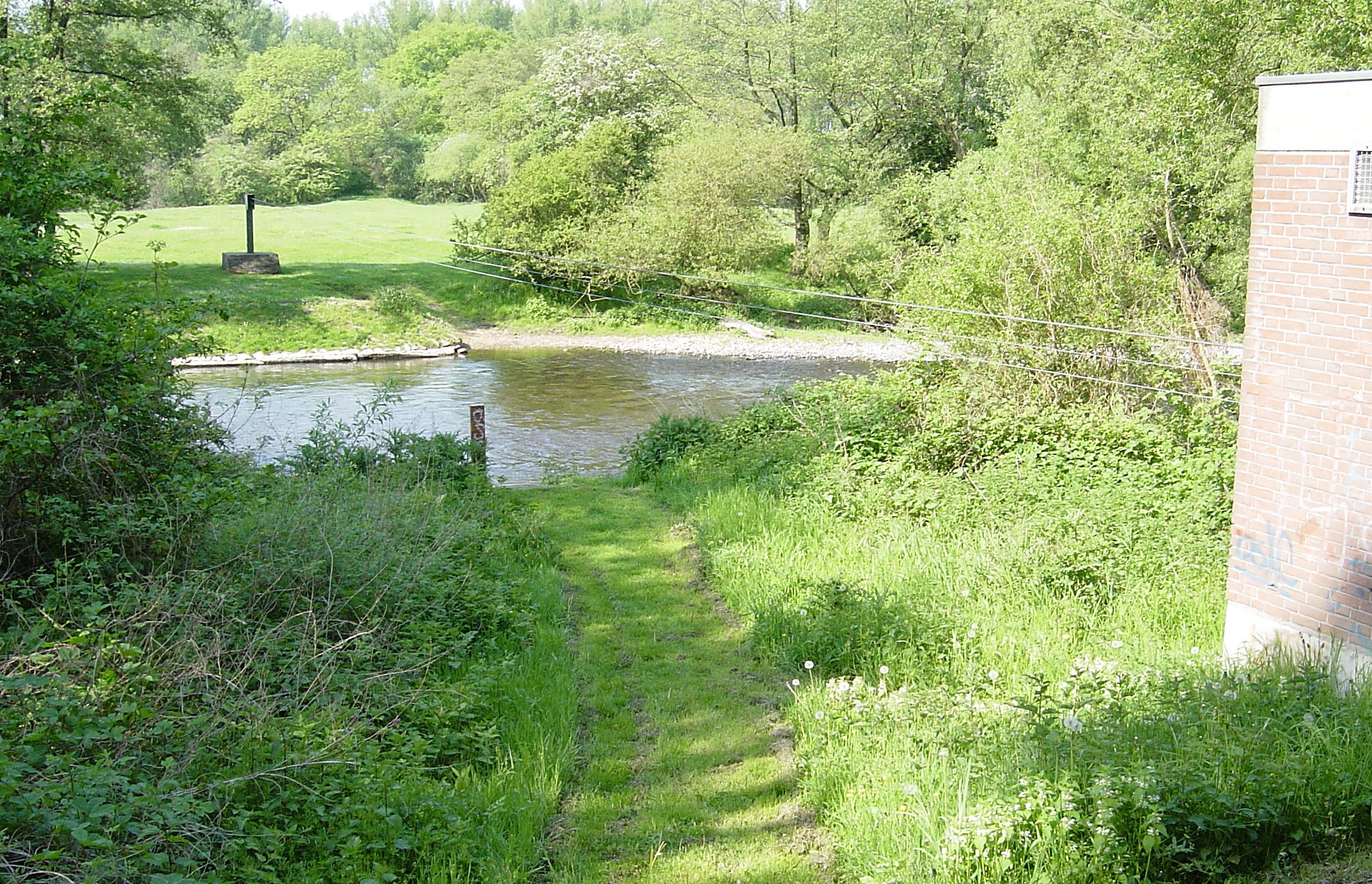 Pegel "Altenburg 1" der Wasserbehörde an der Rur bei Altenburg/Jülich